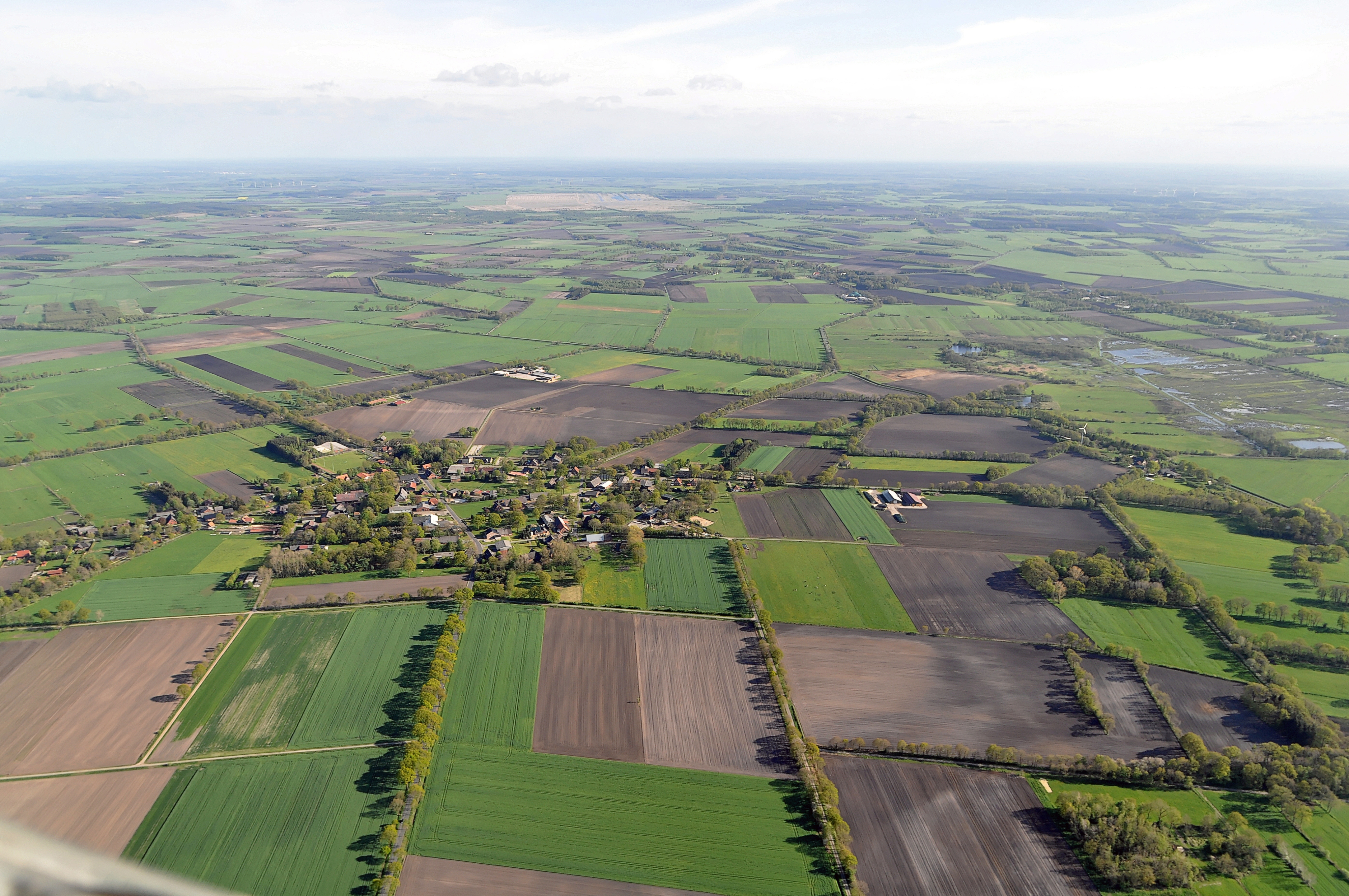 Luftbilder von der Nordseeküste 2012-05